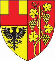 Wappen von Tattendorf